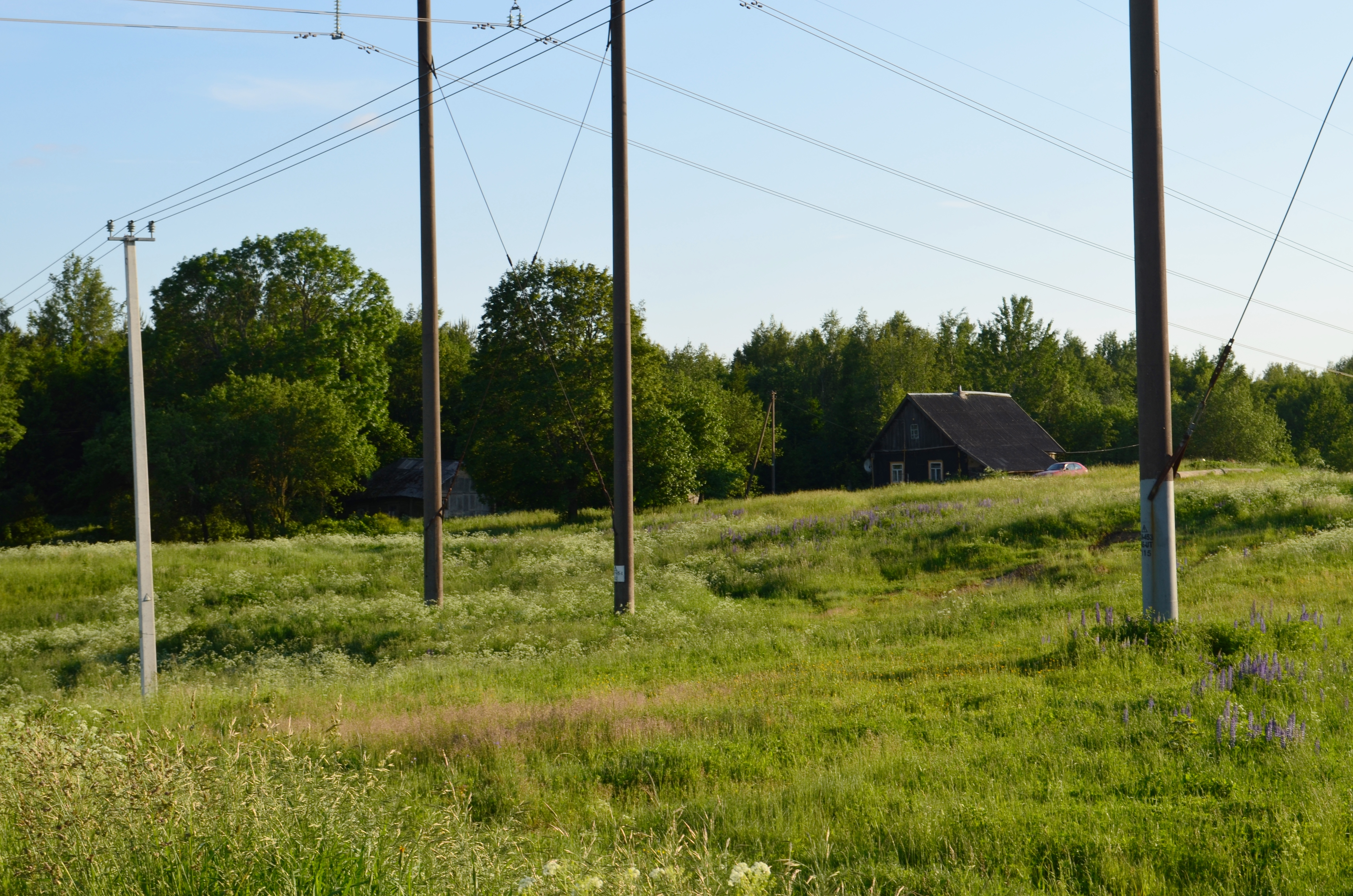 Bajorėliai, Salako sen., Zarasų r.